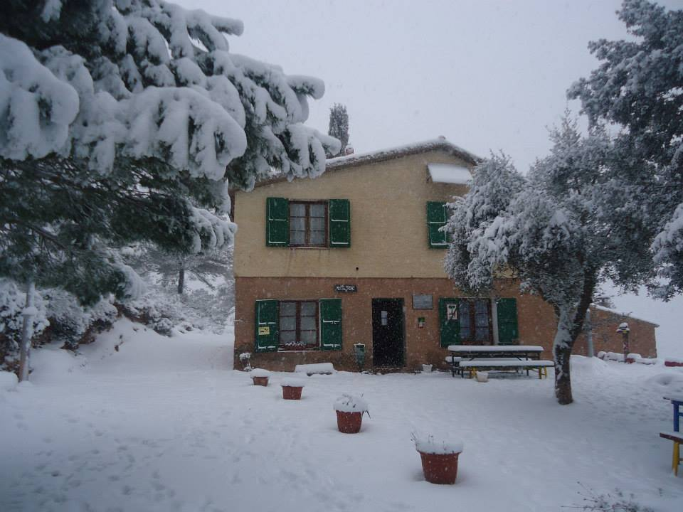 El Refugi Mas del Tronc el 4 de febrer de 2015, després d'una nevada.